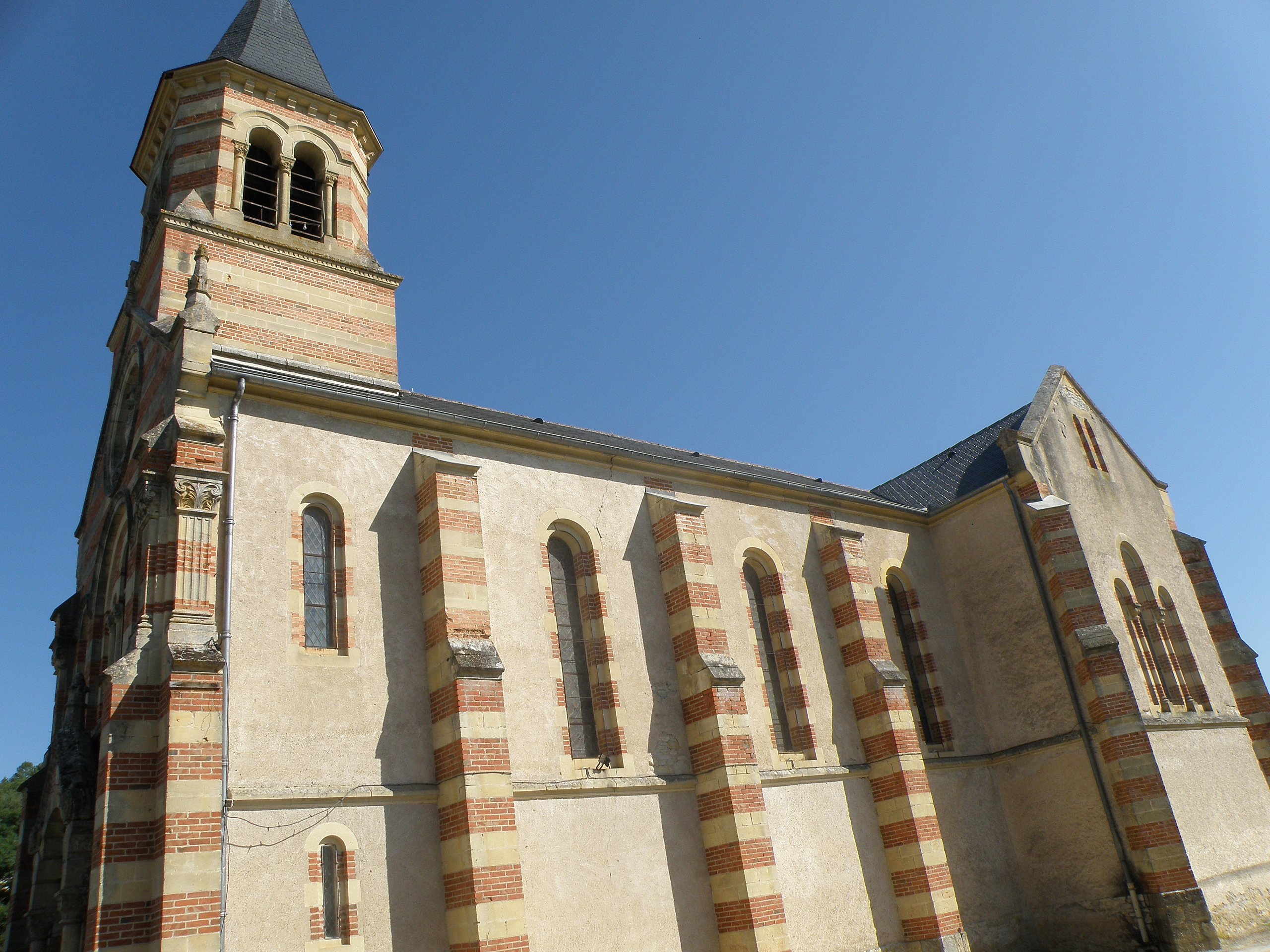 Espère, commune et village du dép. du Lot, à une dizaine de km (à vol d’oiseau) au nord-ouest de Cahors (région Midi-Pyrénées, France). Église Saint-Laurent (XIXe siècle).